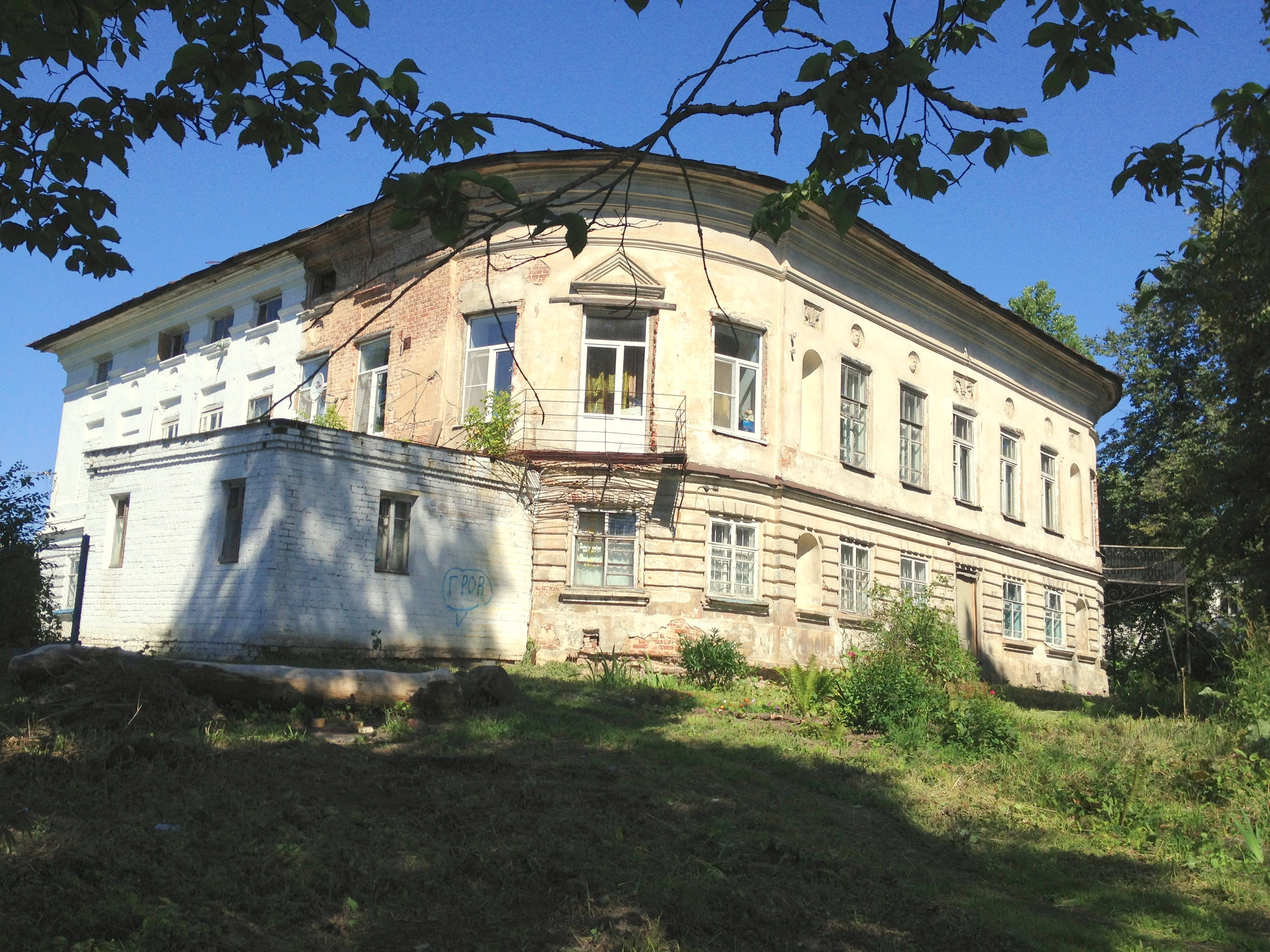 Усадьба Коковцова в Новосёлках, в Ярославле